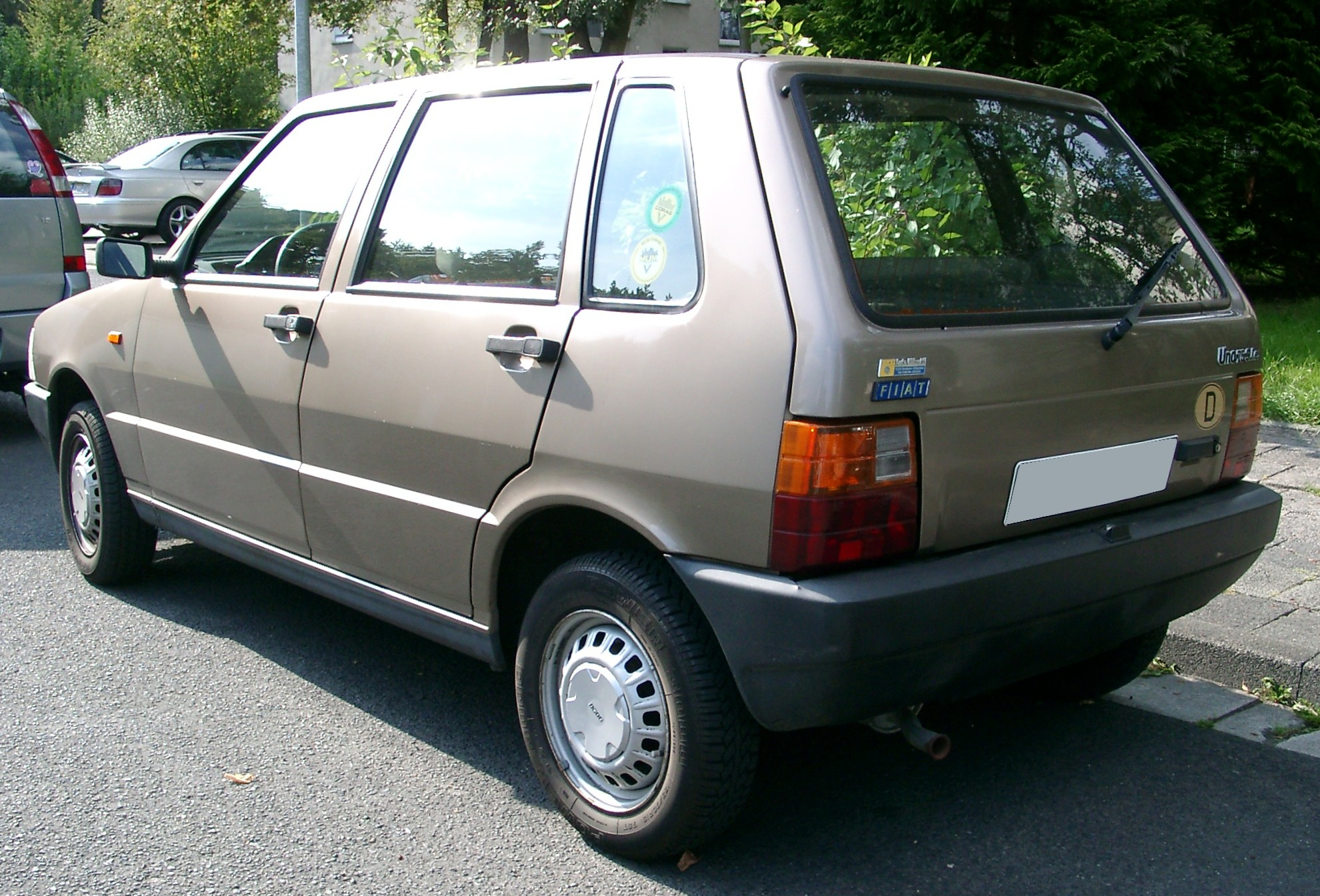 Fiat Uno Mk I